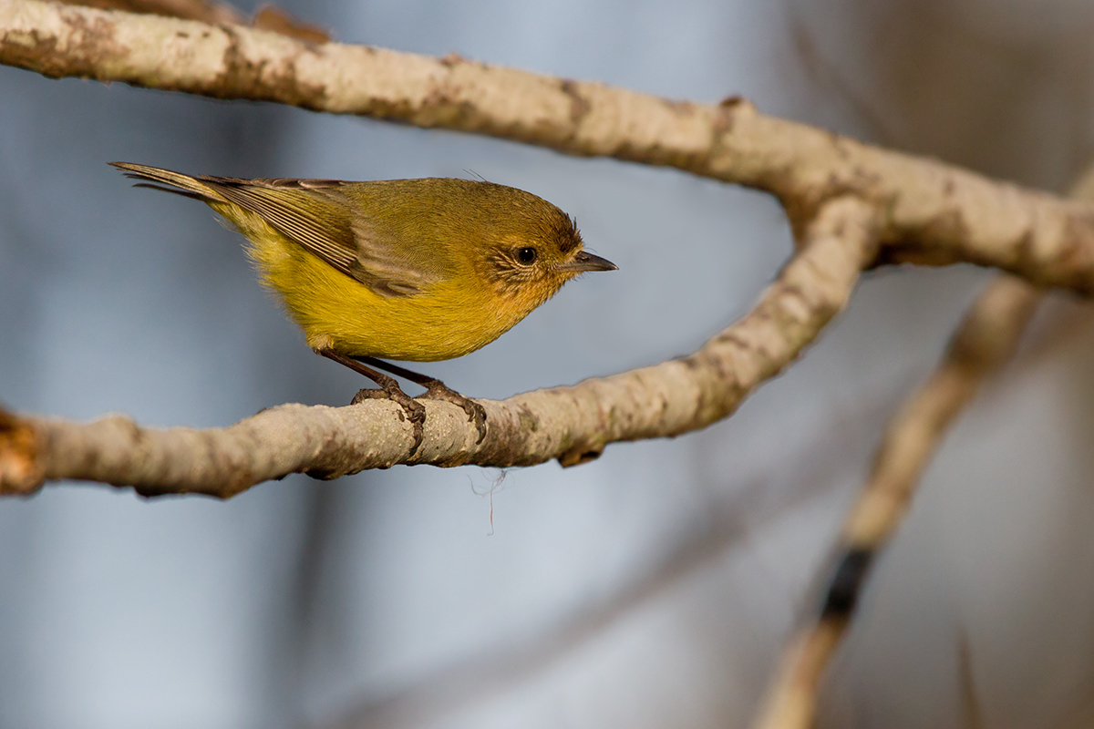 Warriewood Wetland, NSW